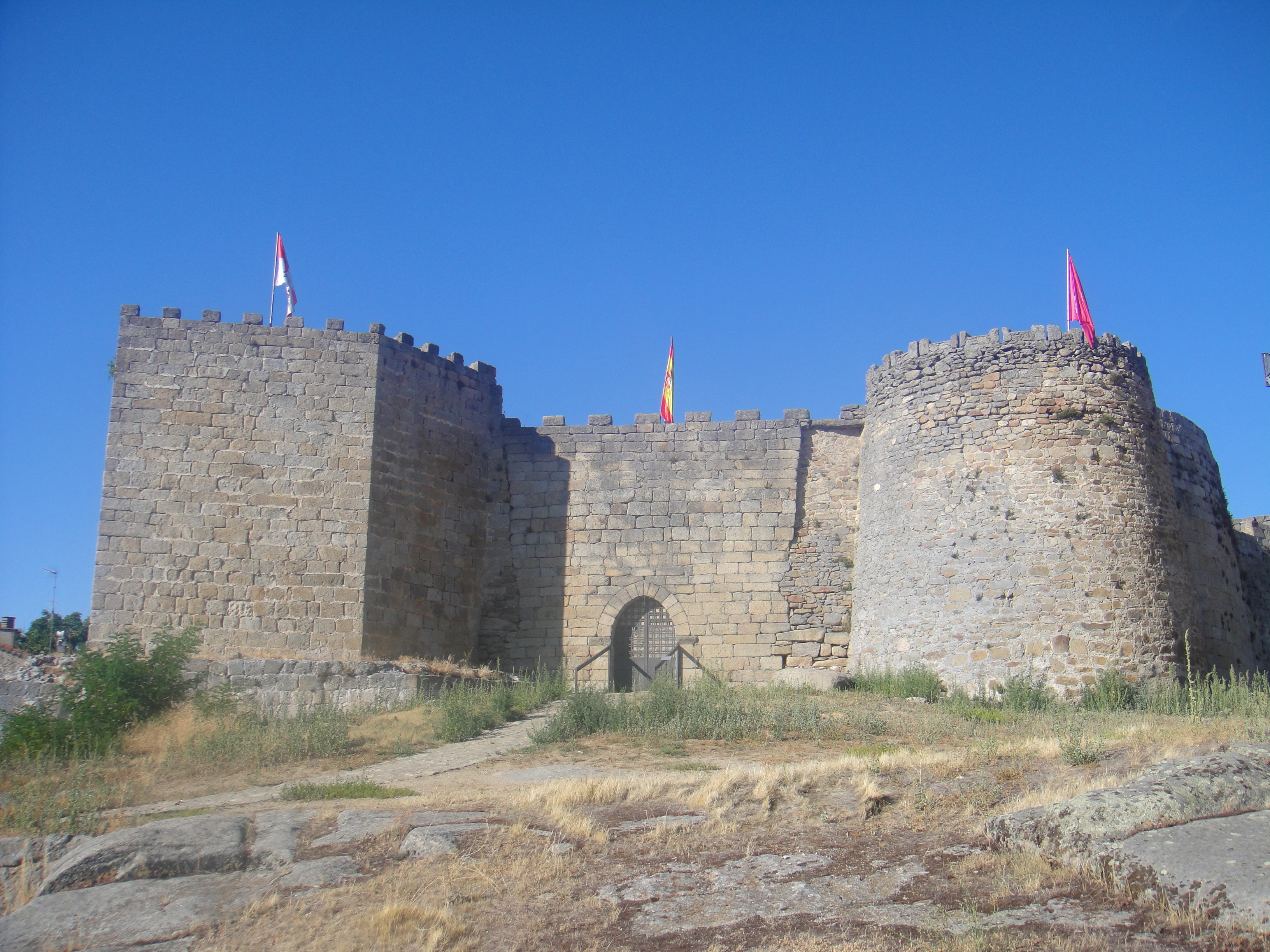 Entrada principal del castillo de Ledesma, construído en la Edad Media. Se encuentra en la provincia de Salamanca, (España).